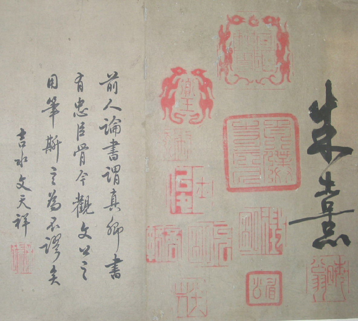 《蓬戶手卷》前代名人題跋.